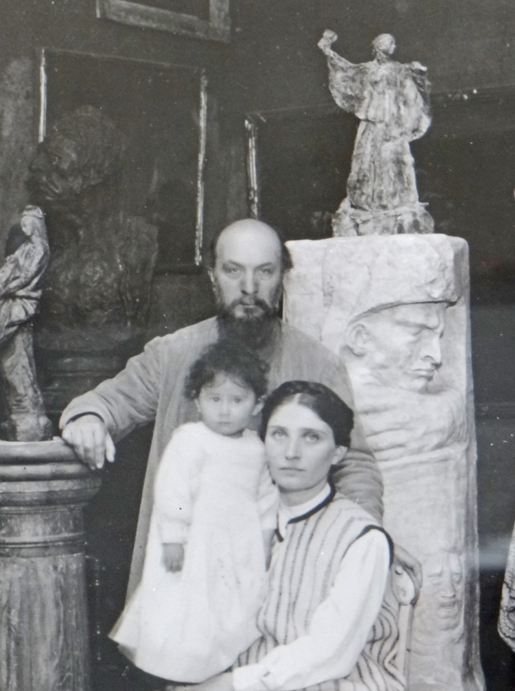 Photo d'archives (détail) montrant l'artiste dans sa maison-atelier avec sa deuxième épouse Cléopâtre Sévastos (1882-1972) et leur fille Rhodia (1911-2002) Auteur anonyme vers 1913 Rhodia Dufet-Bourdelle, épouse du décorateur Michel Dufet, a consacré sa vie à la défense de l’œuvre de son père et a contribué à le faire connaître dans le monde entier. Elle présidait avec sa mère aux destinées du musée Bourdelle dont elle était conservateur depuis 1949, date de son ouverture. Musée Bourdelle, musée de la ville de Paris l'album du musée Bourdelle (photos dalbera)